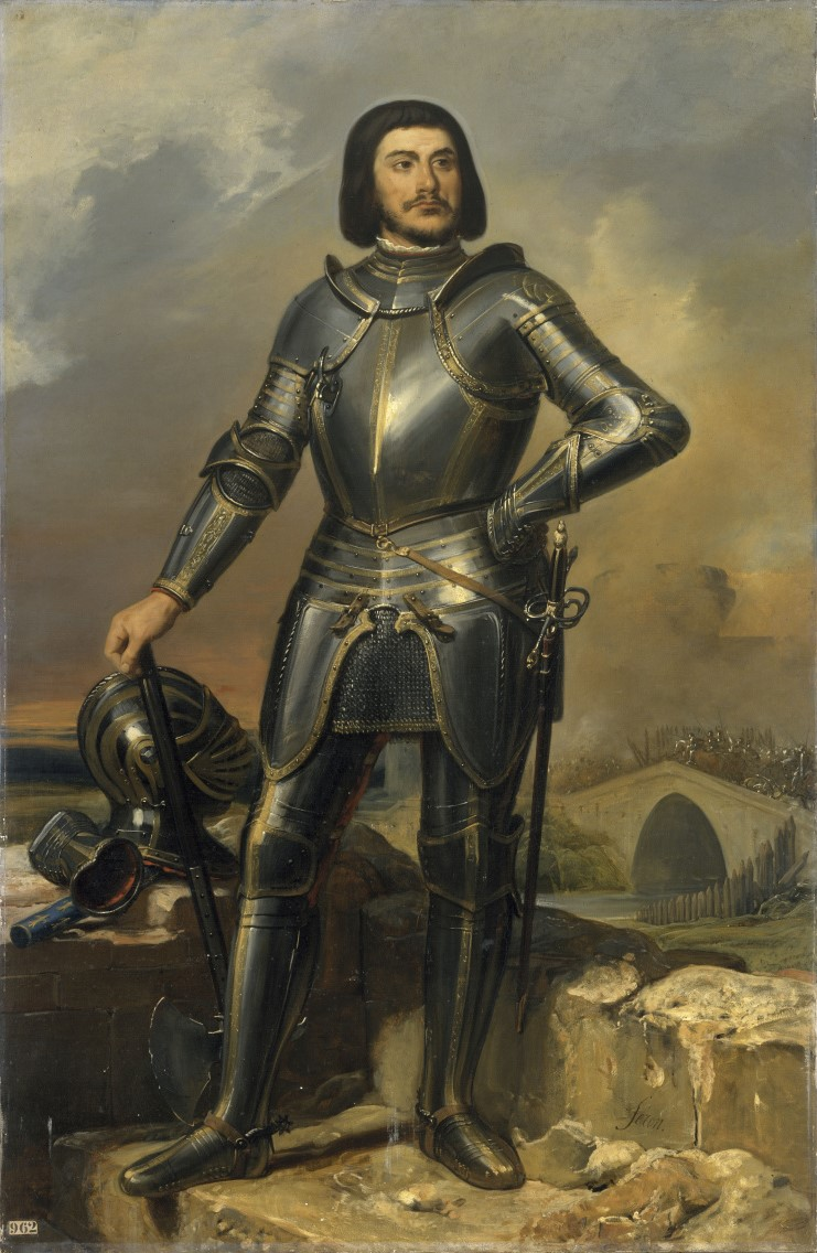 Gilles de Laval, sire de Rais, compagnon de Jeanne d'Arc, Maréchal de France (1404-1440)